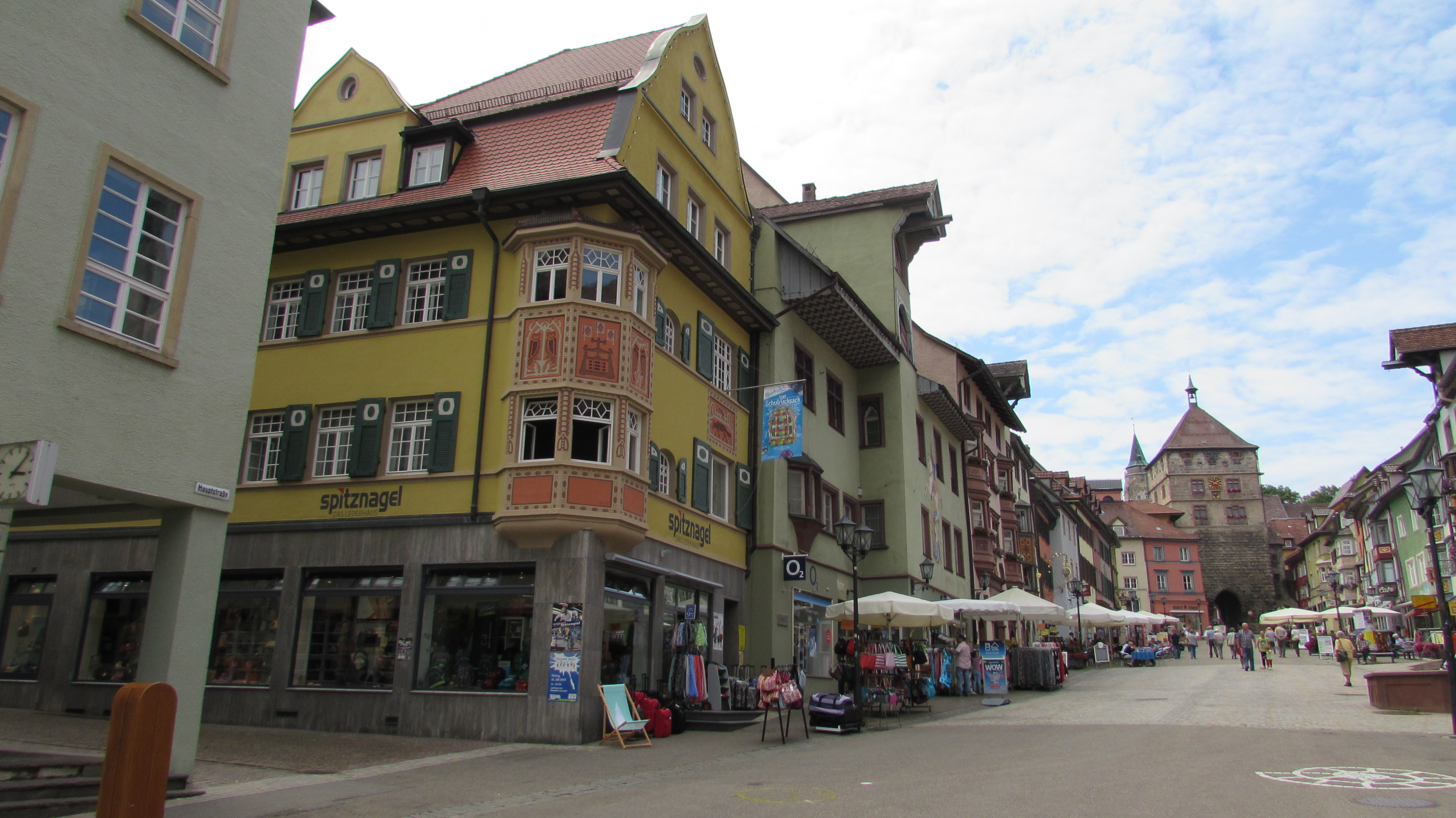 Rottweil Ansicht 2015